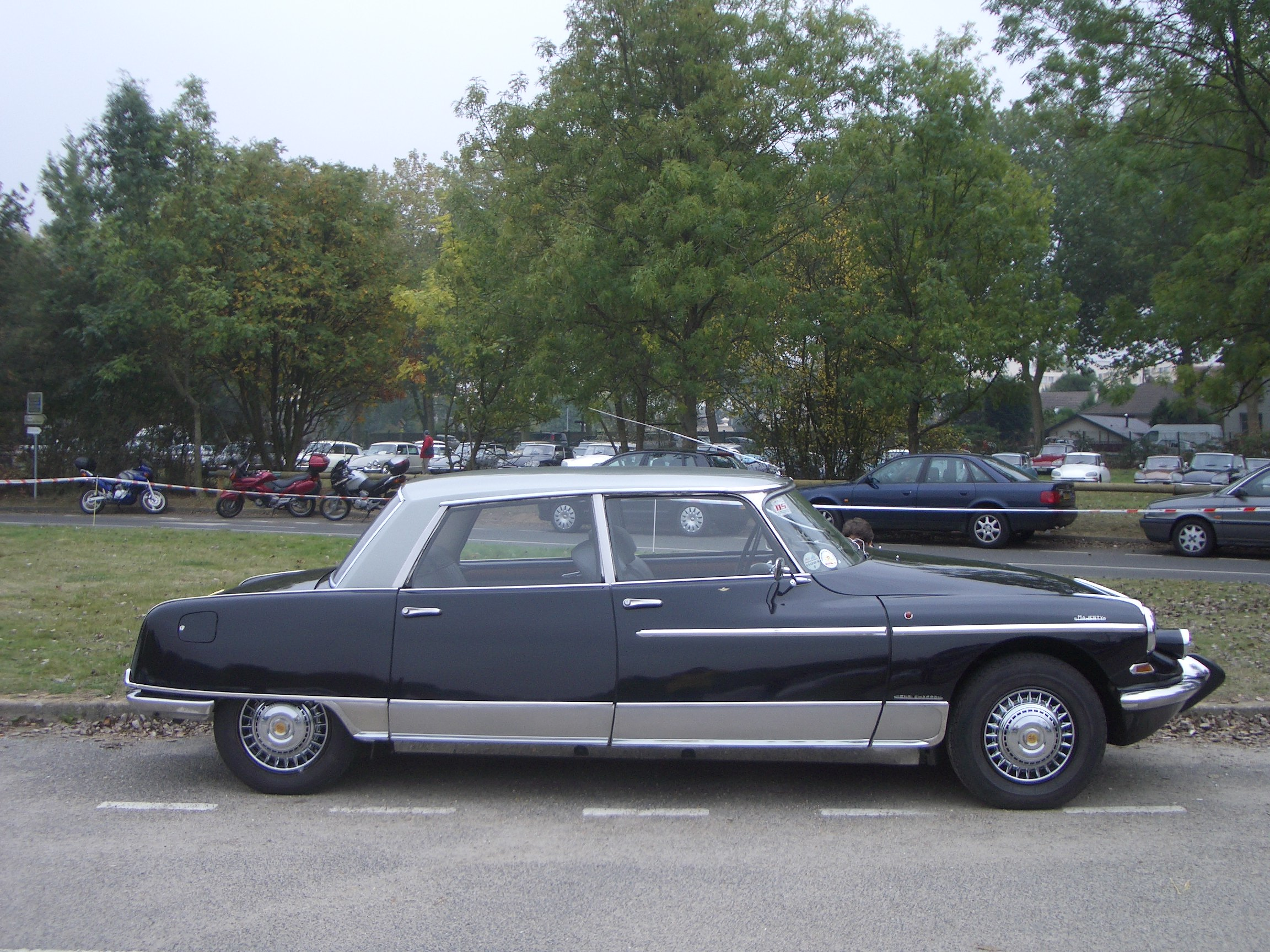 Henri Chapron Majesty Limousine